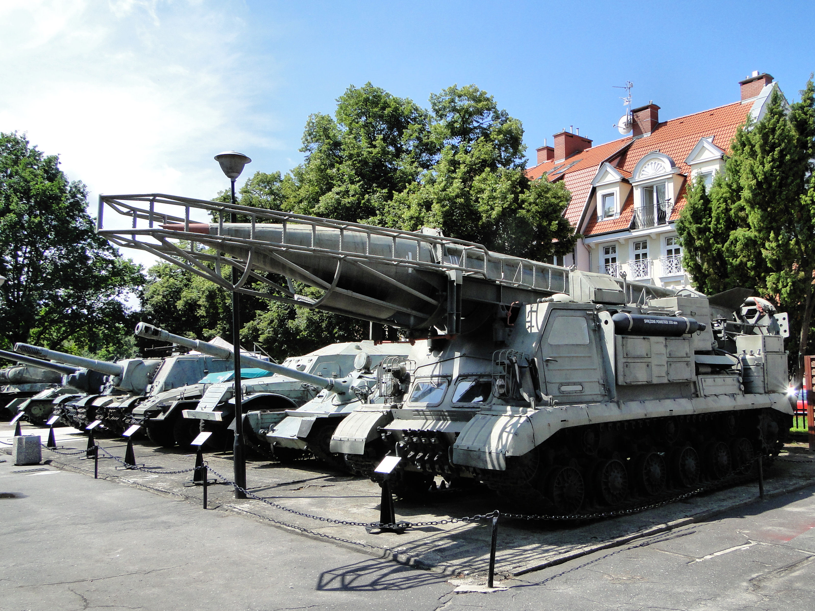 Muzeum Oręża Polskiego w Kołobrzegu